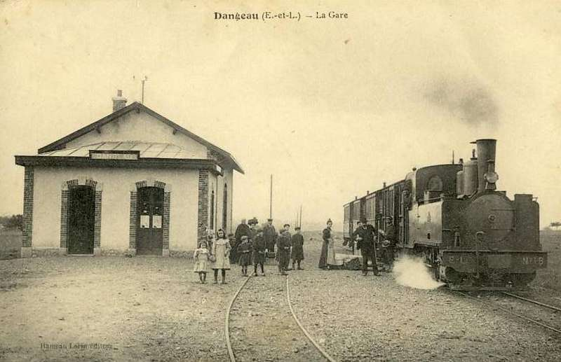 La gare de Dangeau (Tramways d'Eure et Loir). Locomotive n°18 nom "Dangeau" (Corpet Louvet n°1085 de 1907).